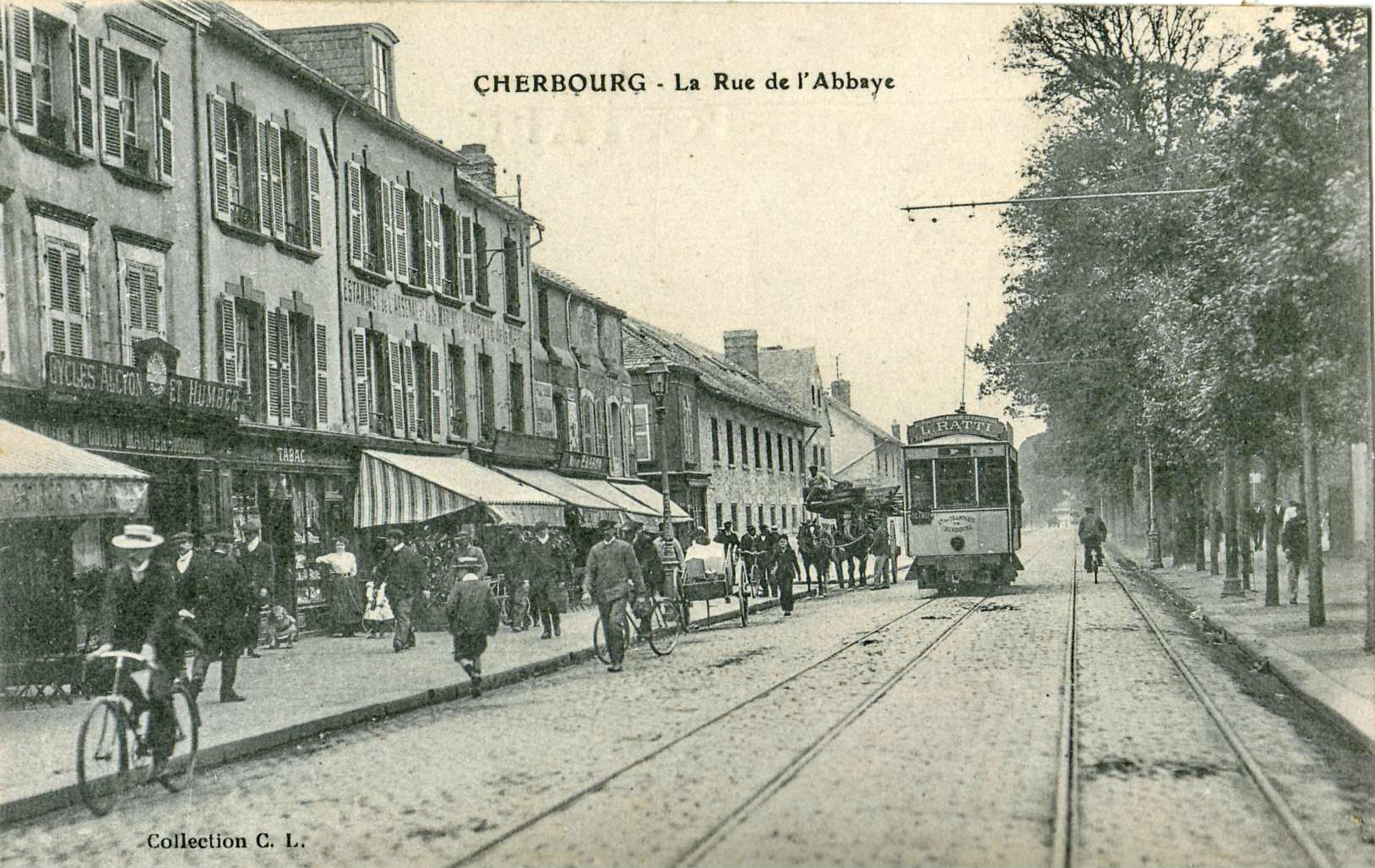 Carte postale ancienne éditée par CL : CHERBOURG - La rue de l'Abbaye. Vue d'une rame du Tramway de Cherbourg, sans doute à destination de l'Octroi